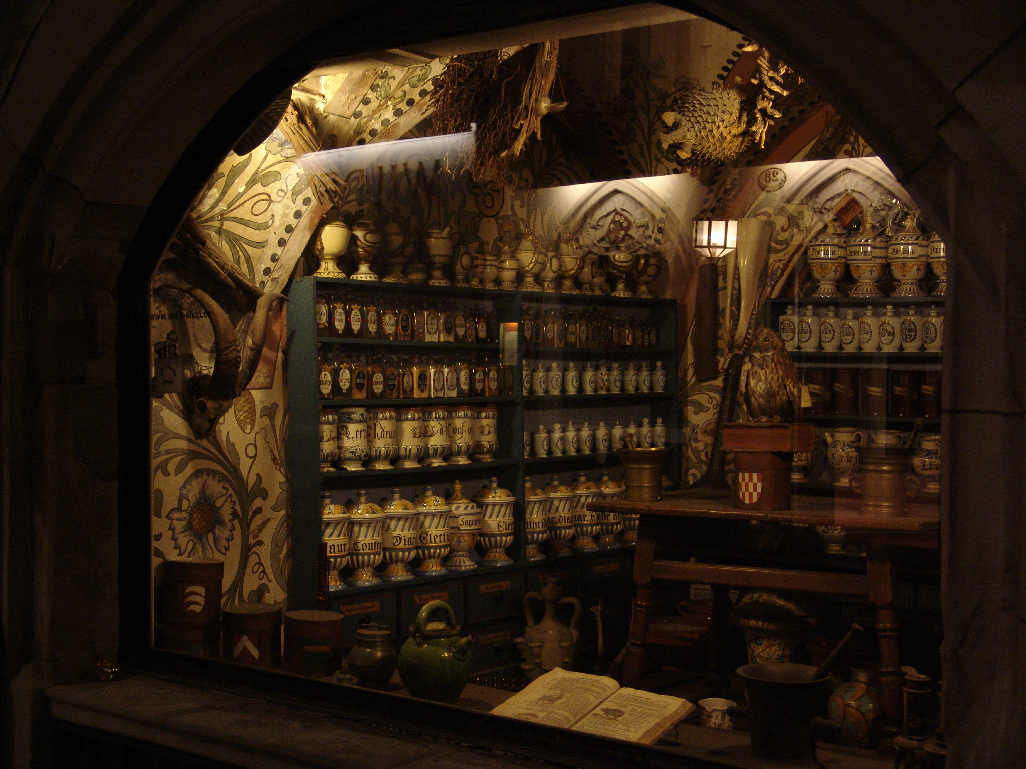 Apotheke in Luzern